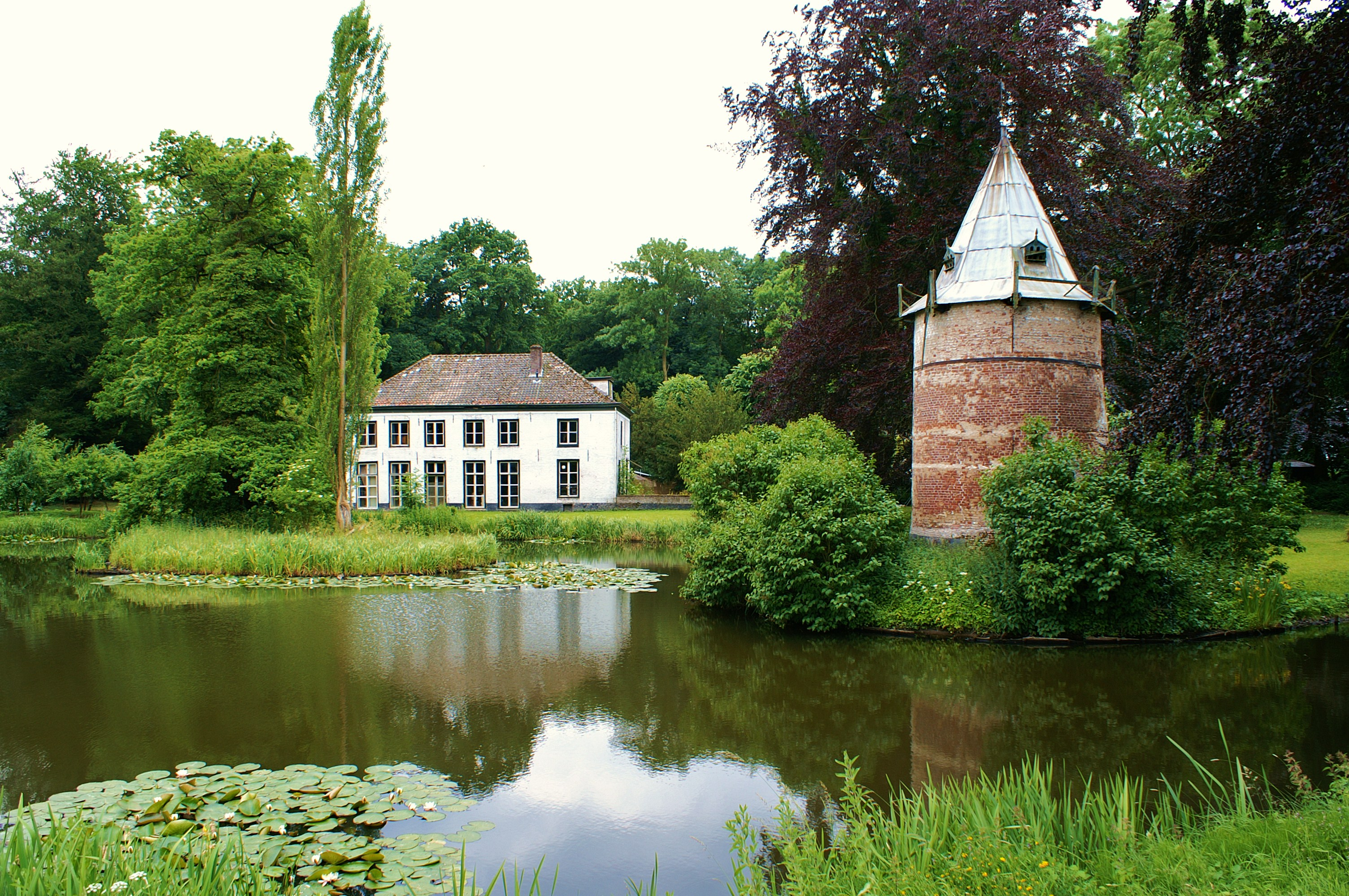 Huis Wickenburgh met duiventoren te 't Goy.